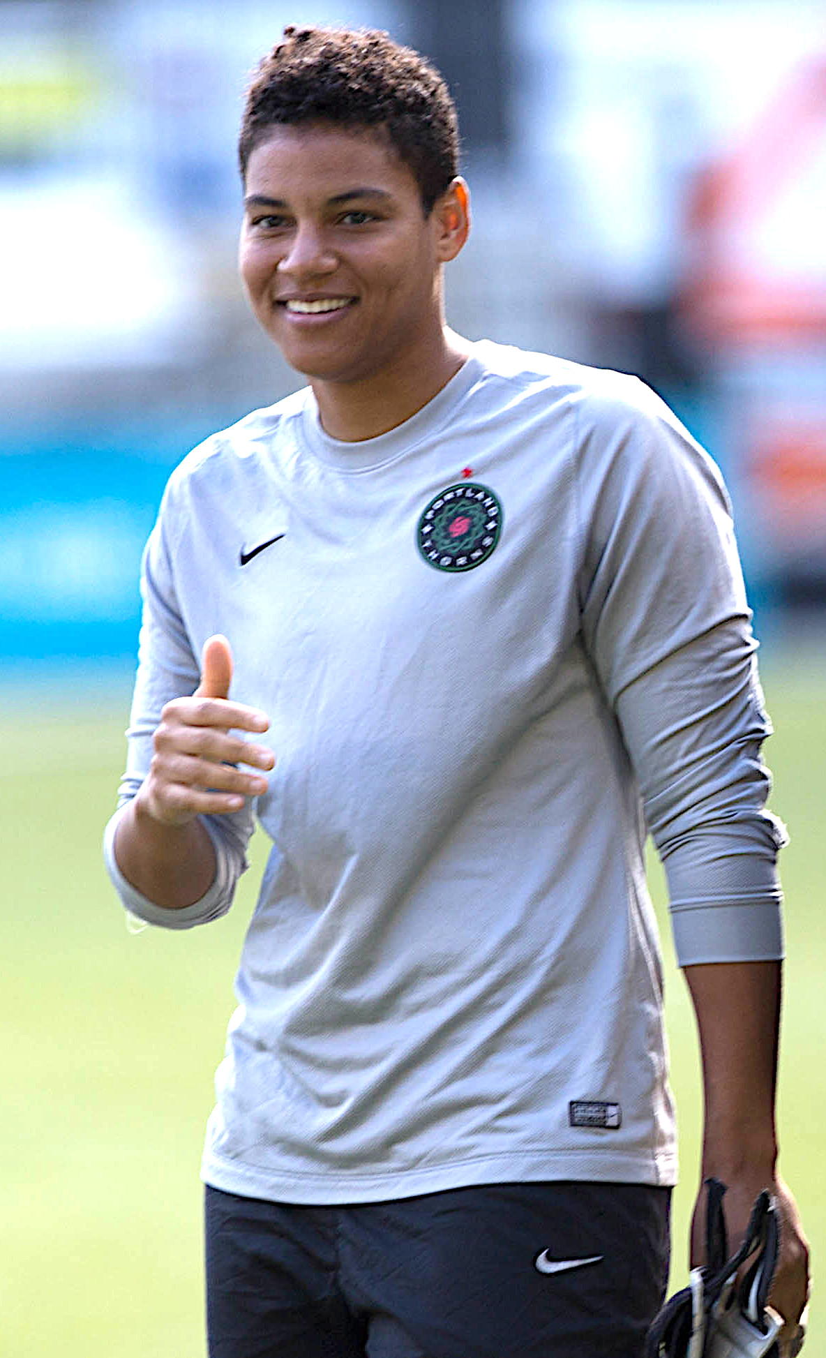 N42A2647.jpg